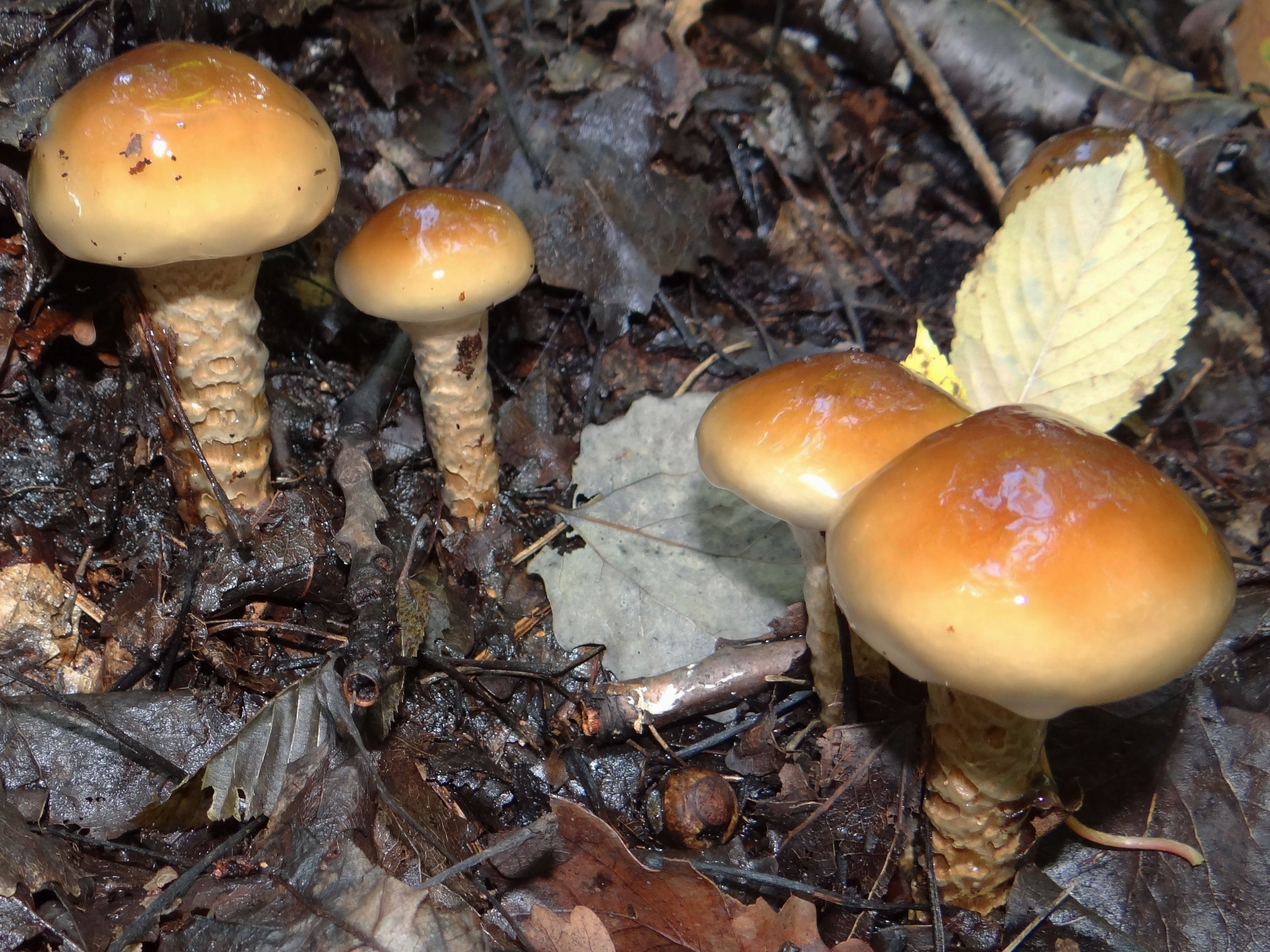 Cortinarius trivialis